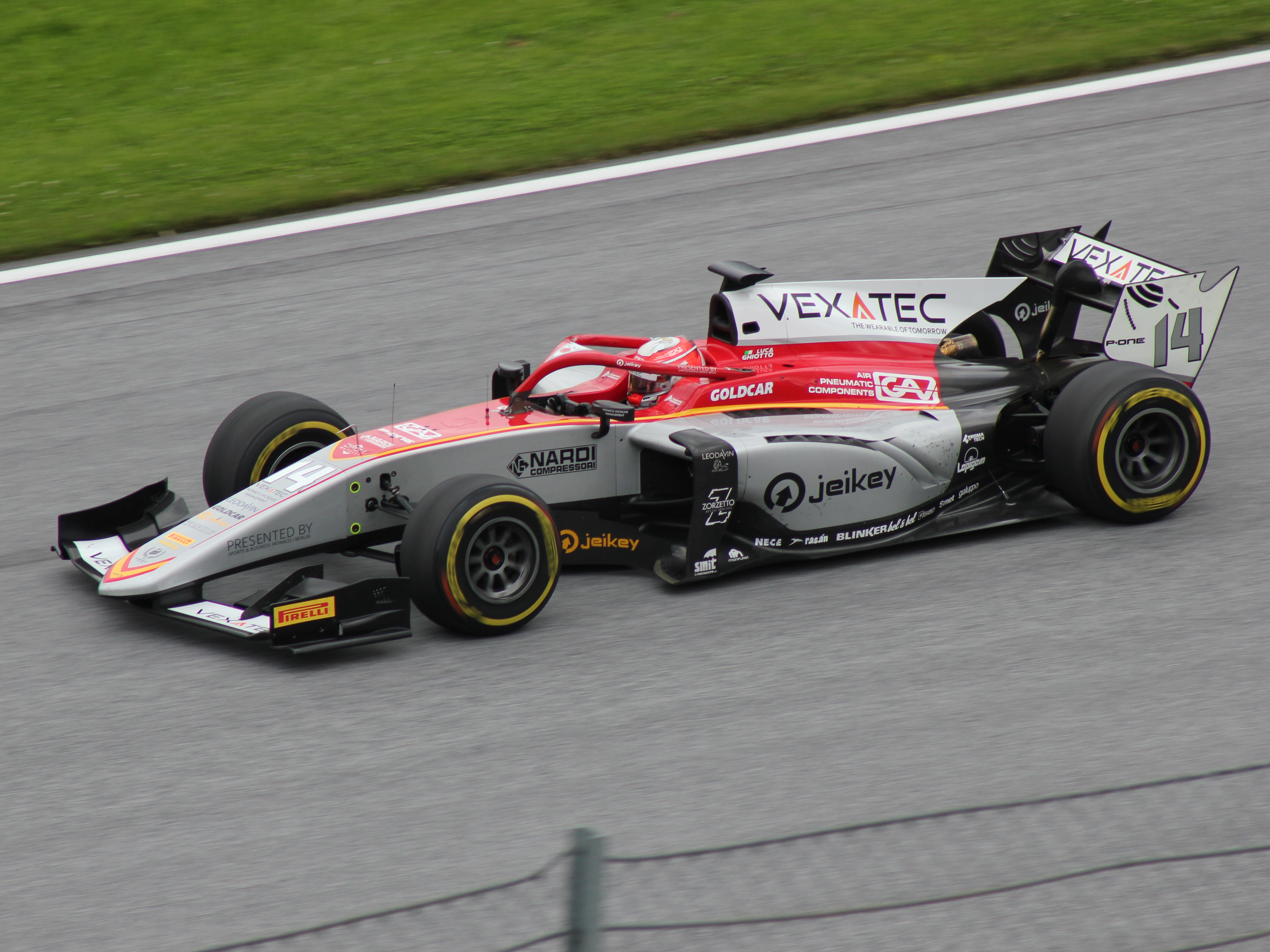 14 Luca Ghiotto beim Rennwochenende in Österreich 2018 (1)